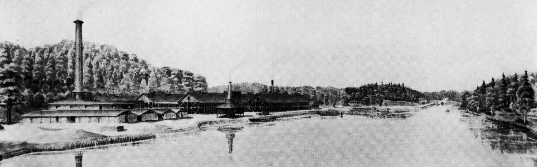 Kiholms tegelbruk 1900, efter en akvarell